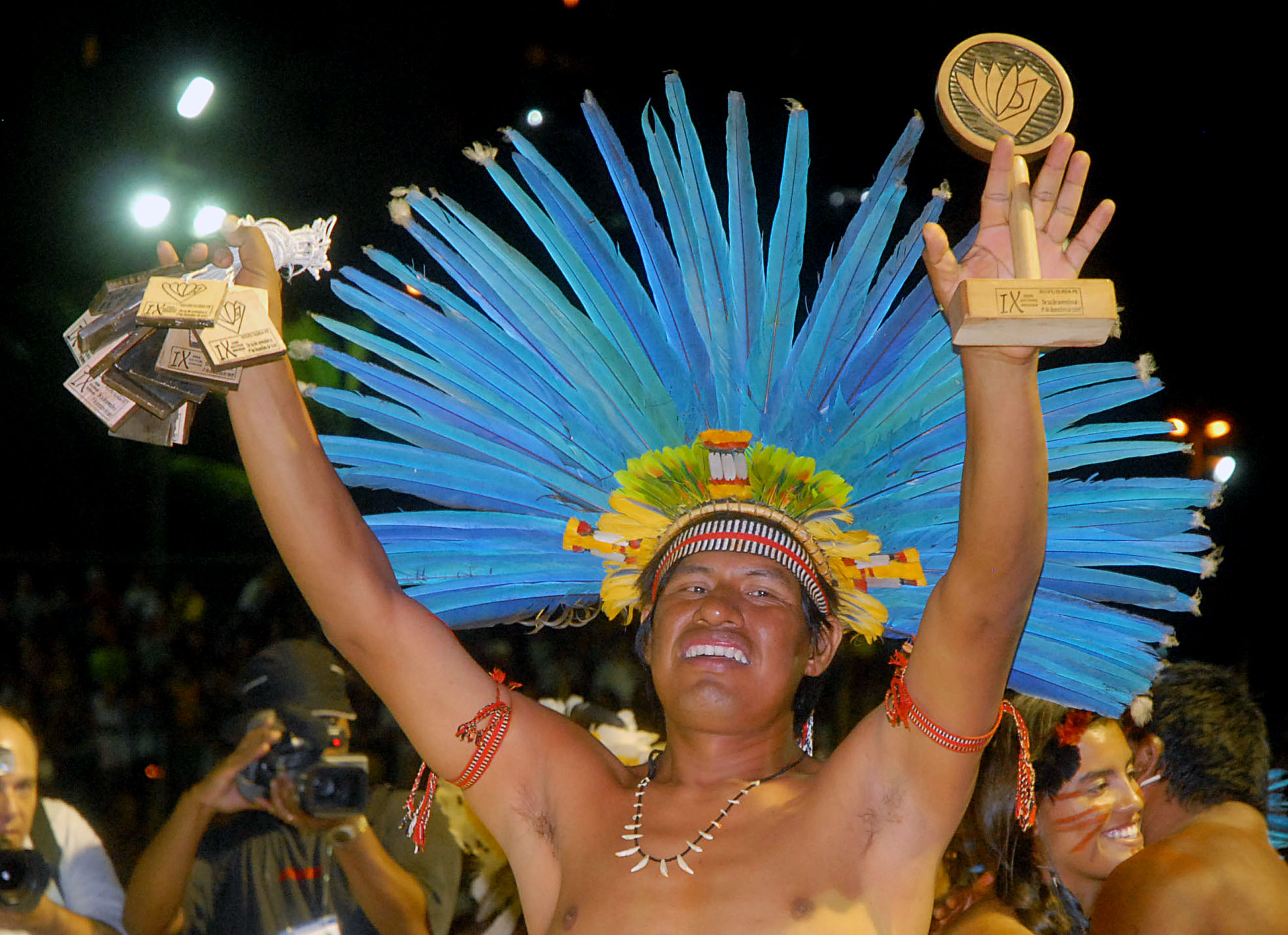 Cacique Paulo, da etnia Bororo-Boe na cerimônia de encerramento da nona edição dos Jogos dos Povos Indígenas (Olinda PE)